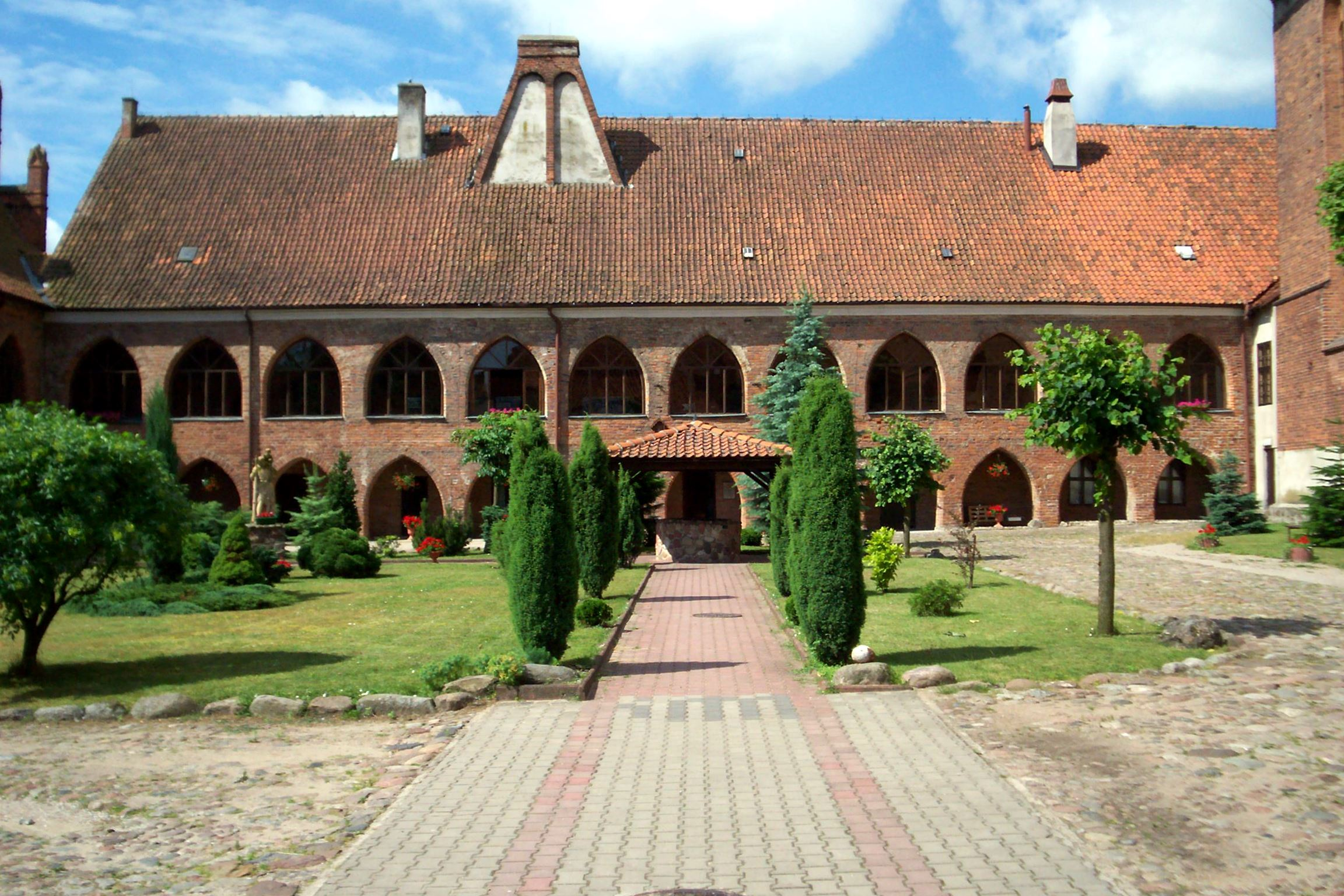 Kolegiata pw. Zbawiciela i Wszystkich Świętych w Dobrym Mieście - dziedziniec